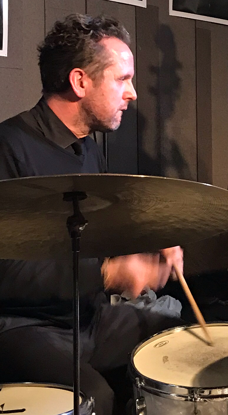 Joost Patocka Genomen tijdens opname in De Kring in Amsterdam